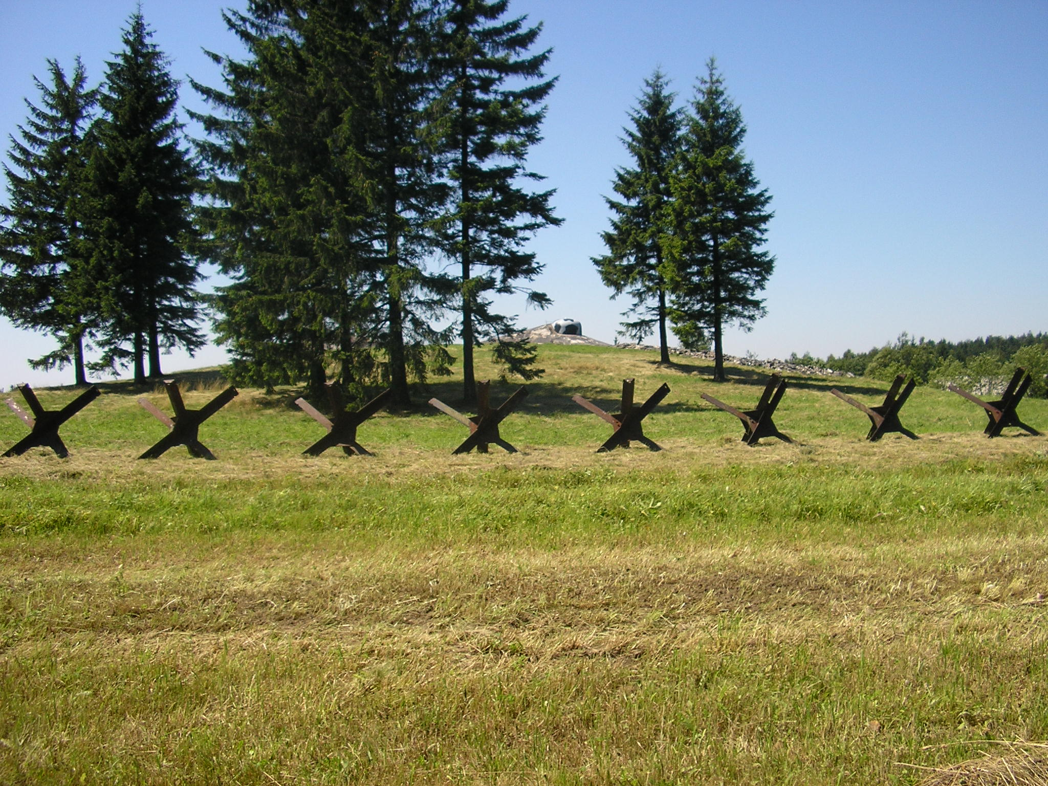 Przykład zapory typu jeż - przełęcz nad Bartosovicami w Górach Orlickich. Za zaporami widoczne dzwony pancerne schronu R-S-74 "Na Holem".